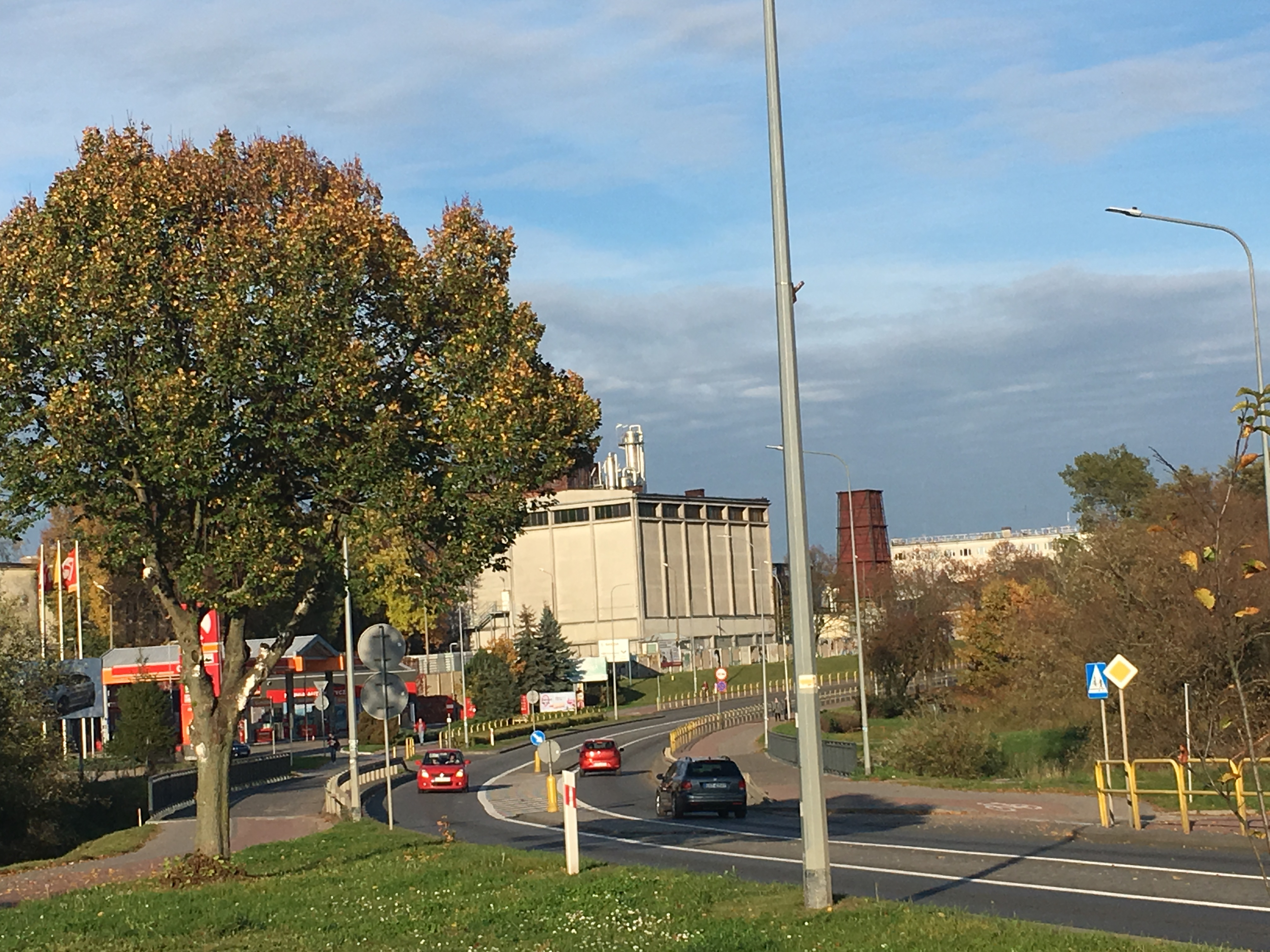 Destylarnia Sobieski, Starogard Gdański, widok na ulice: Wł. Jagiełły i gen. Sikorskiego.